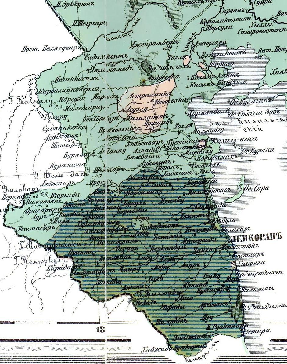 Этнографическая карта Ленкоранского уезда, 1880 г. (Масштаб: 1:1080000).